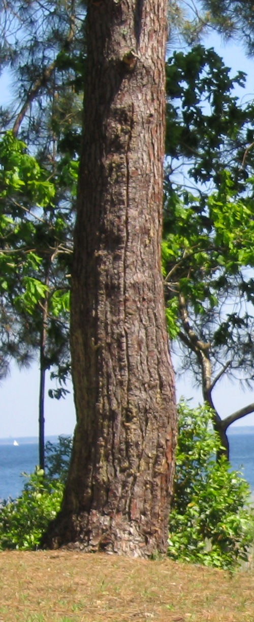 Pin gemmé cicatrisé (La Teste de Buch, Gironde, Aquitaine, France)